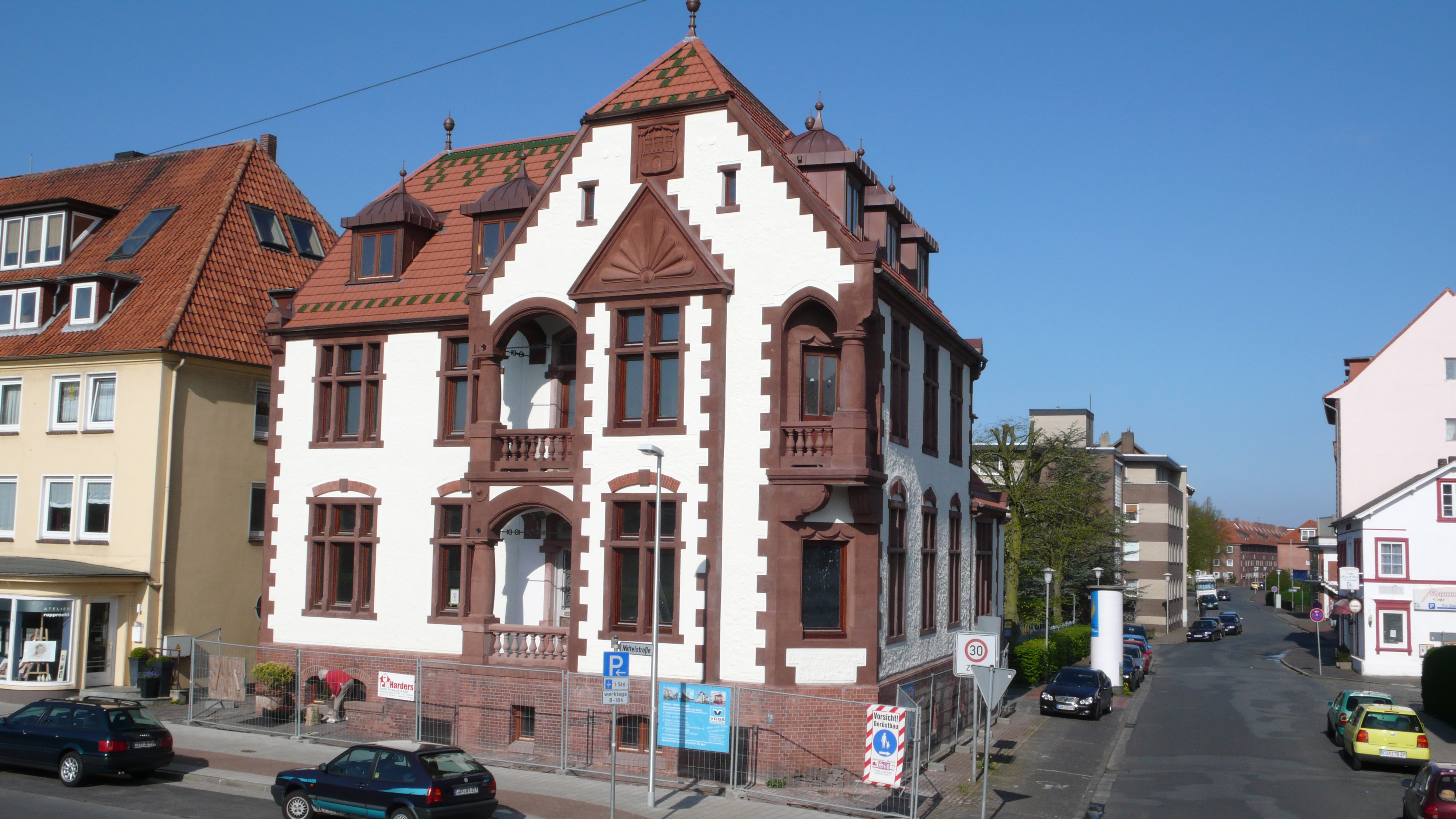 Das Haus Deichstraße 13A wurde erbaut 1897 als Polizeiwache erbaut, später war es das Ordnungsamt der Stadt Cuxhaven.